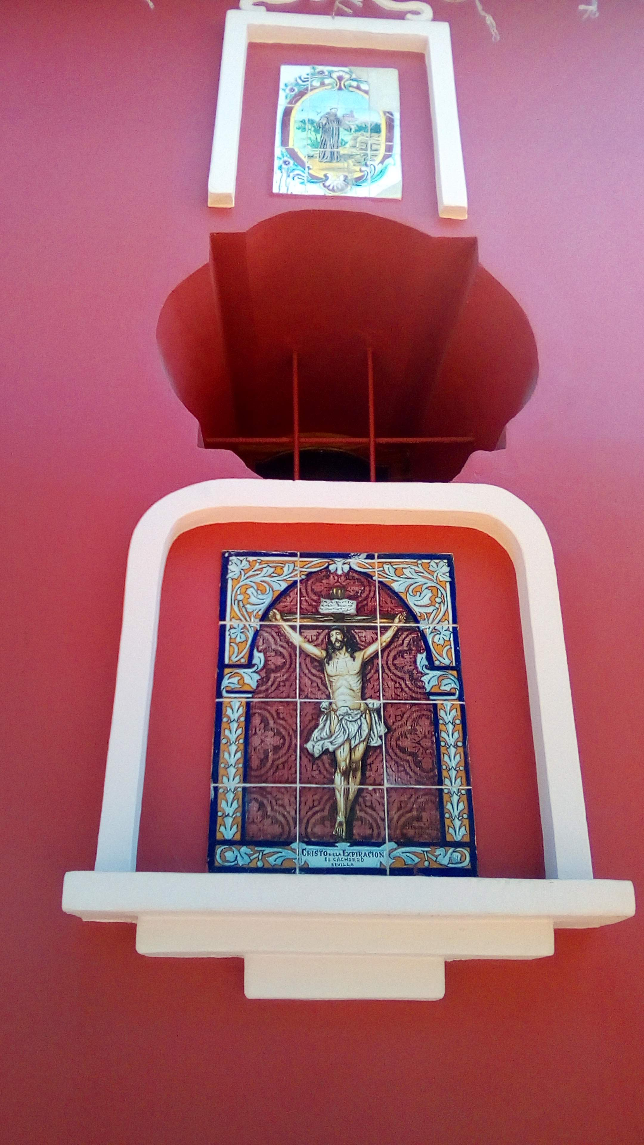 Jesús en una casa de Comayagua.